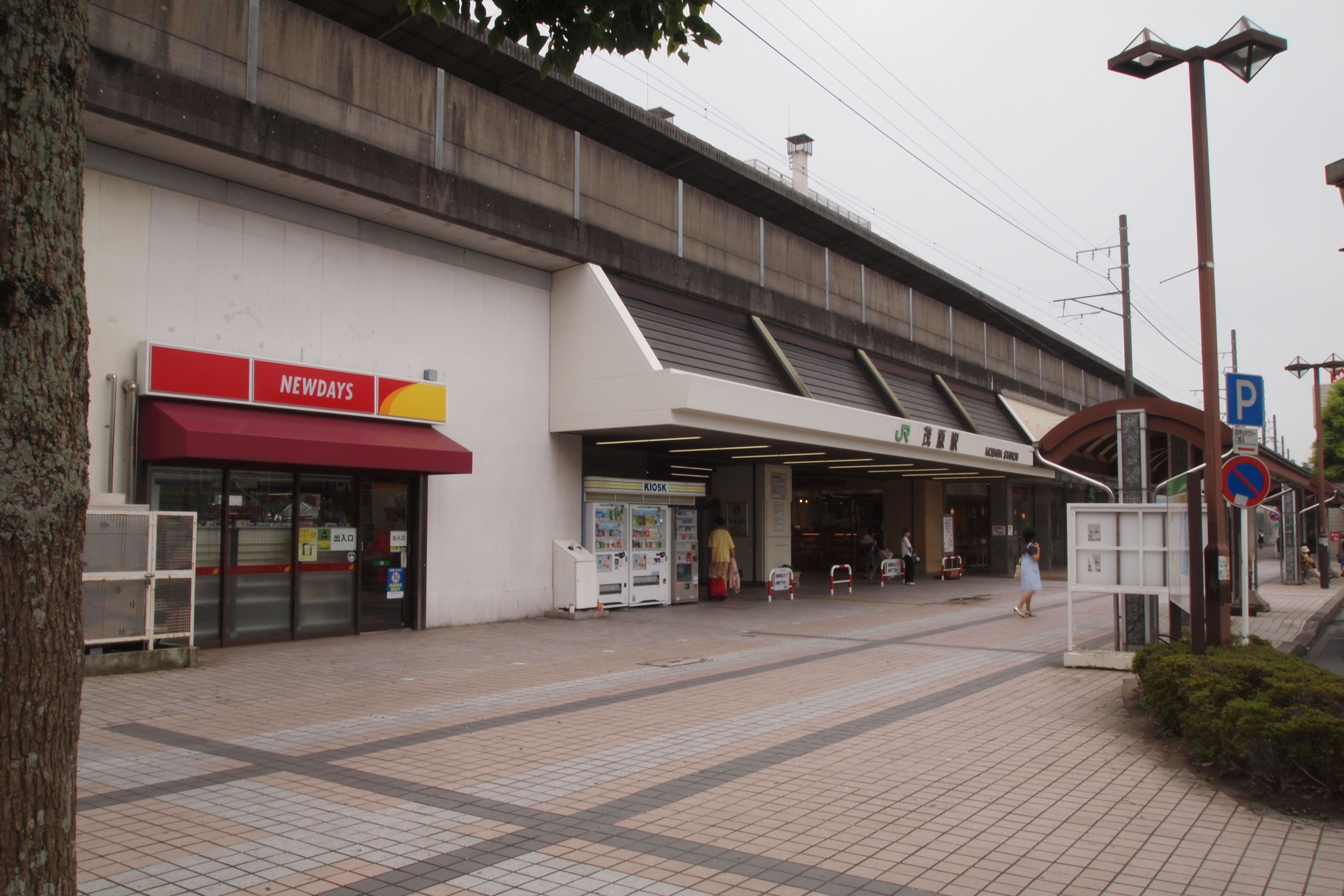 茂原駅